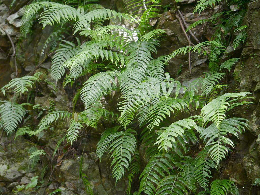 Asplenium wrightii：クルマシダ 2015/07/18 和歌山県田辺市：Tanabe City. Wakayama Pref. Japan